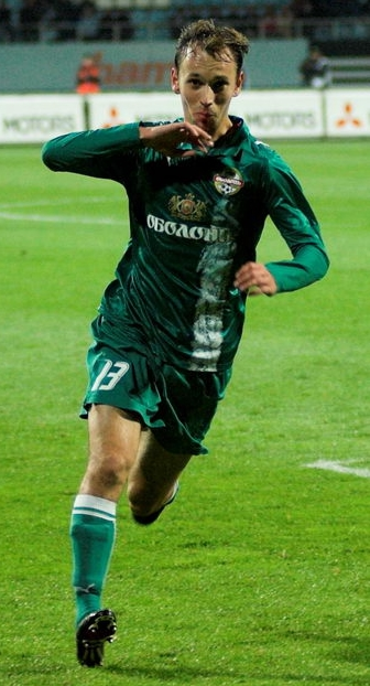 Сергей Александрович Яворский — украинский футболист.